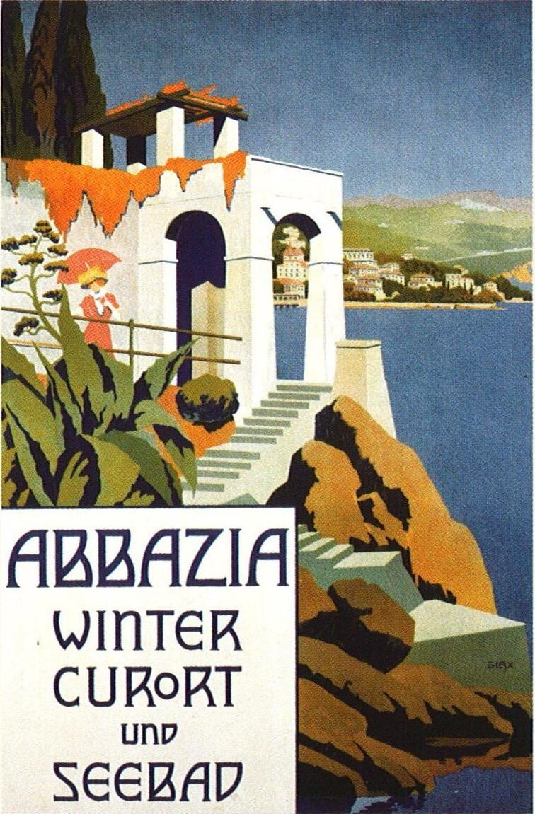 Plakat "Abbazia - Winter Curort und Seebad".